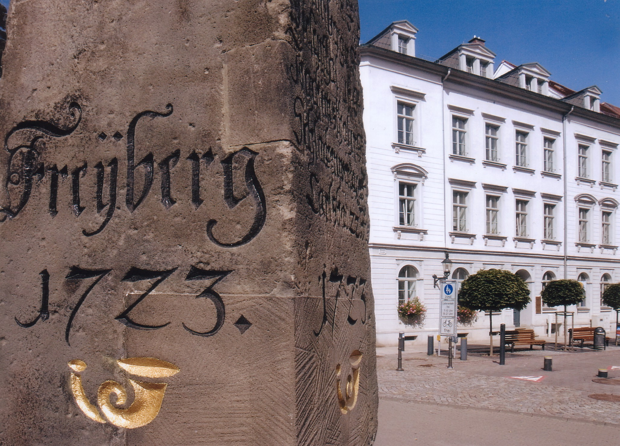 Historisch restauriertes Wohnhaus in Freiberg / Sachsen